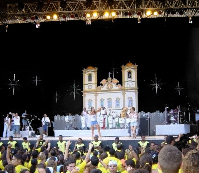 Ivete Sangalo na turnê Píer Bahia com o cenário da Igreja do Bonfim, em 2003.